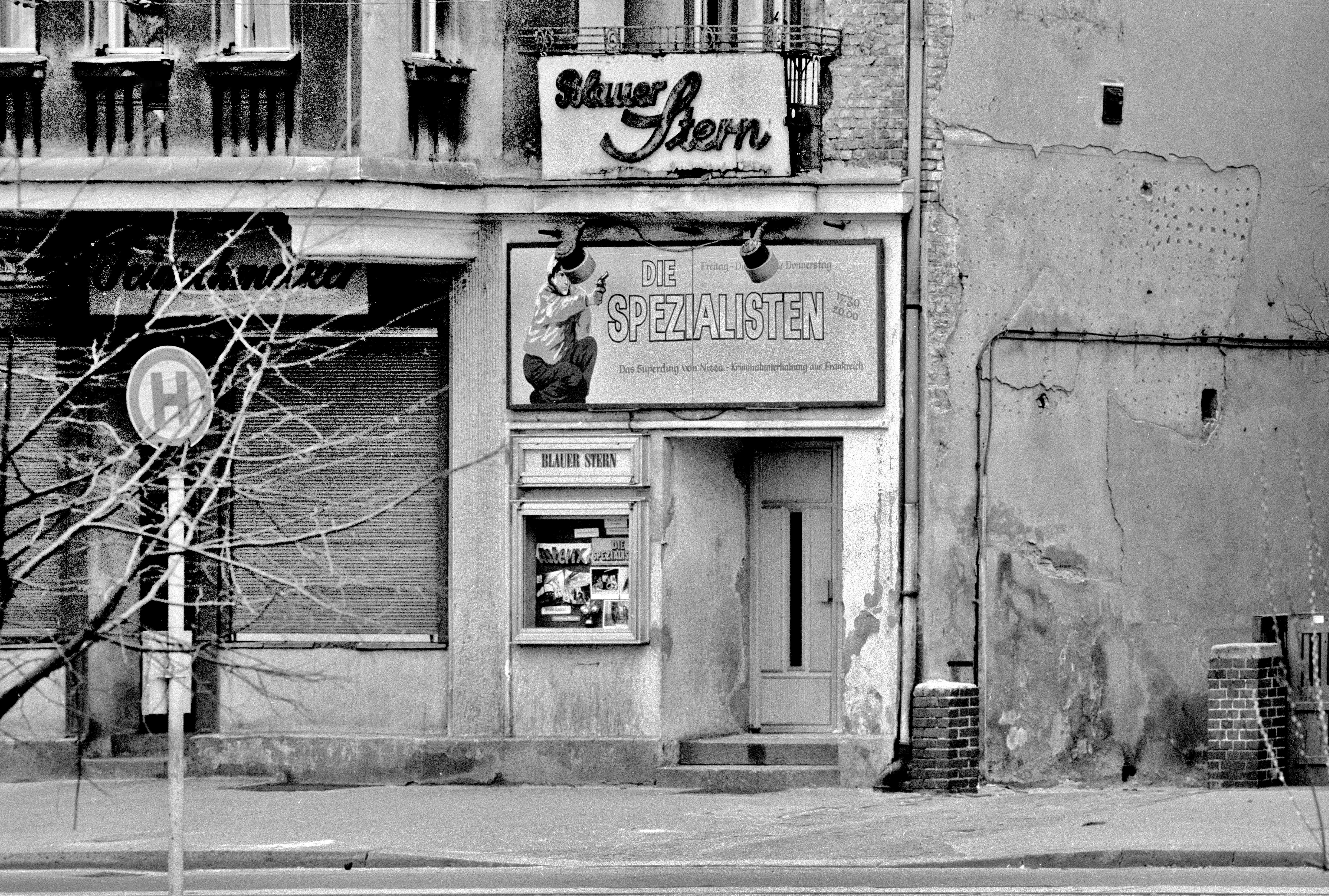 Grabbeallee Ecke Güllweg , 21.12.1986